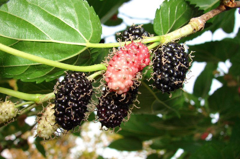 Amora a fruit